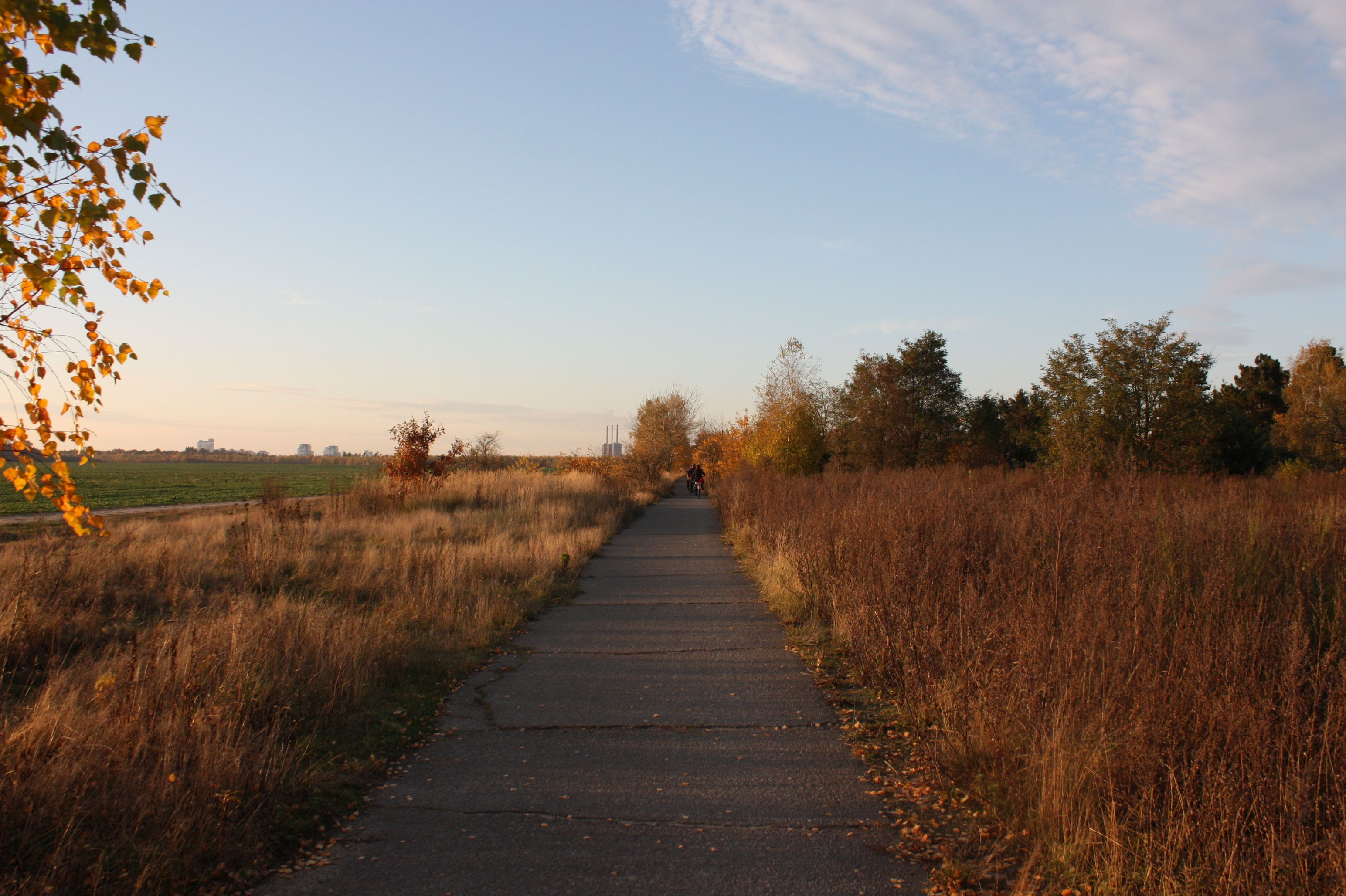 Berliner Mauerweg bei Lichtenrade. Links neben dem Weg im Hintergrund das Kraftwerk Lichterfelde.